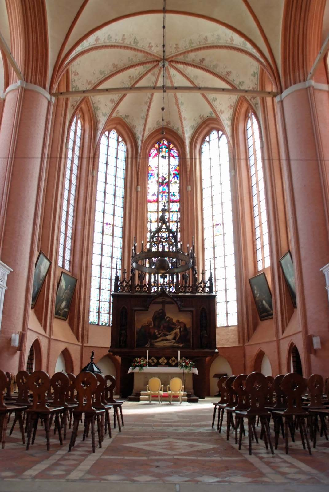 Michaeliskirche in Lüneburg